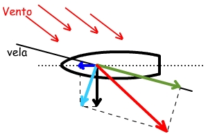 figura explicando navegação à bolina